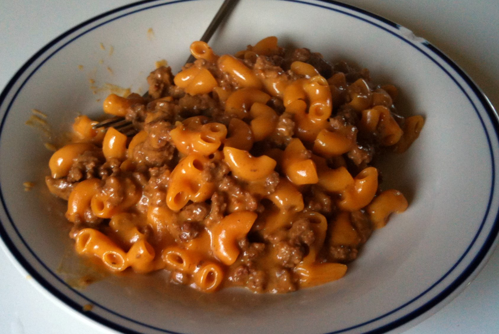 Prepared beef Hamburger Helper